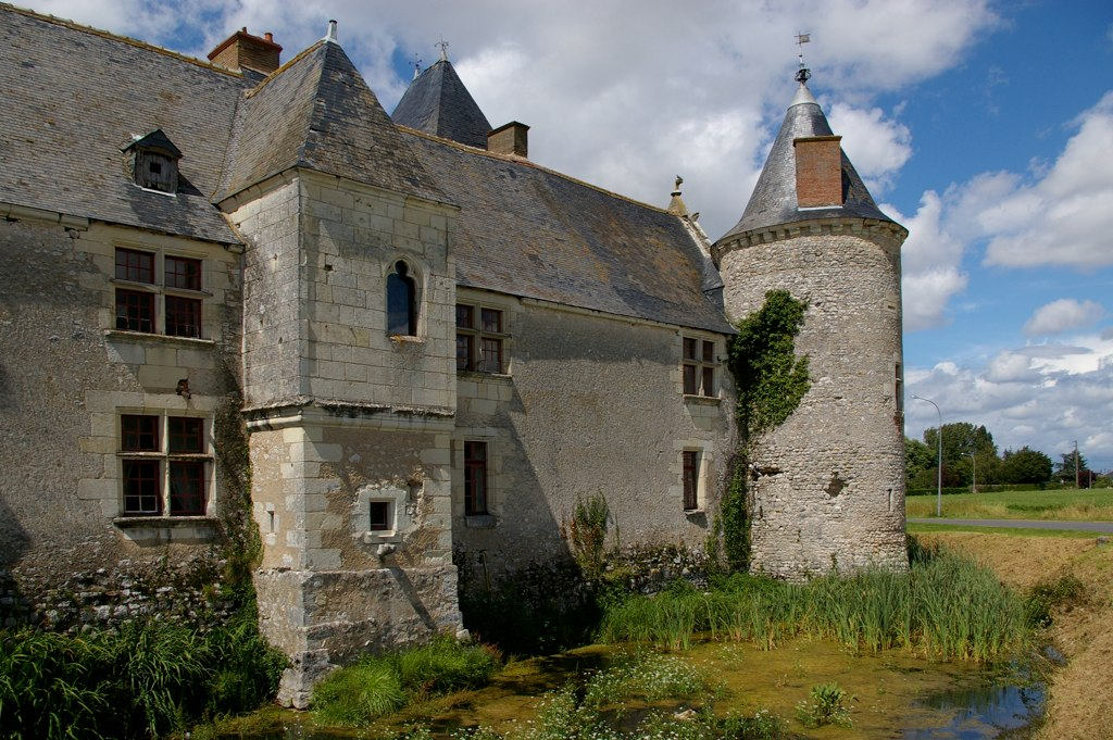 Le château de Chémery